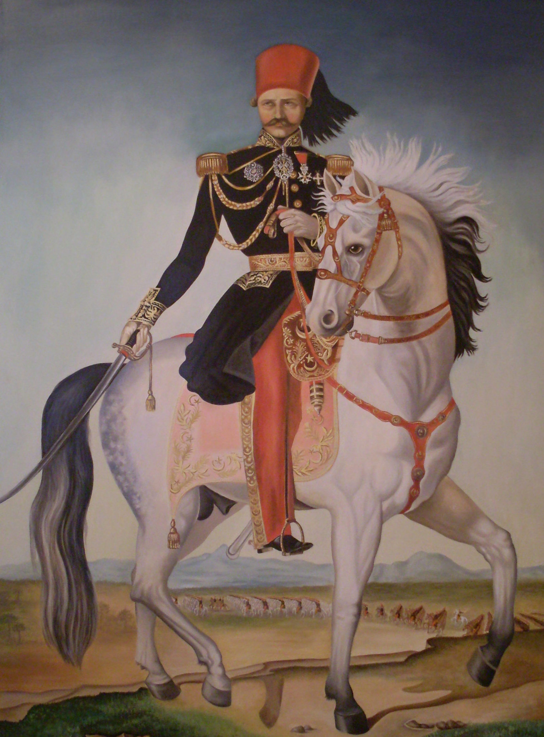 Portrait équestre du général de brigade Kheireddine Portrait équestre du général de brigade Kheireddine Pacha en train de superviser un exercice de cavalerie sur les hauteurs de La Manouba Huile sur toile, 275 x 219 cm Tunis, Institut national du patrimoine, collection Qsar es-Saïd, inv. 46-07-28-09